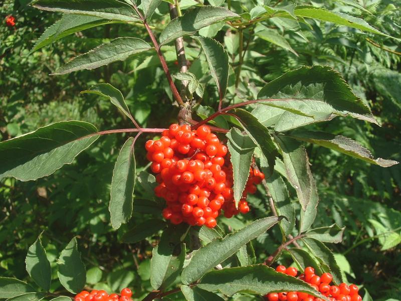 Sureau à grappes, photo J.F. Gaffard, Esprels, juillet 2004